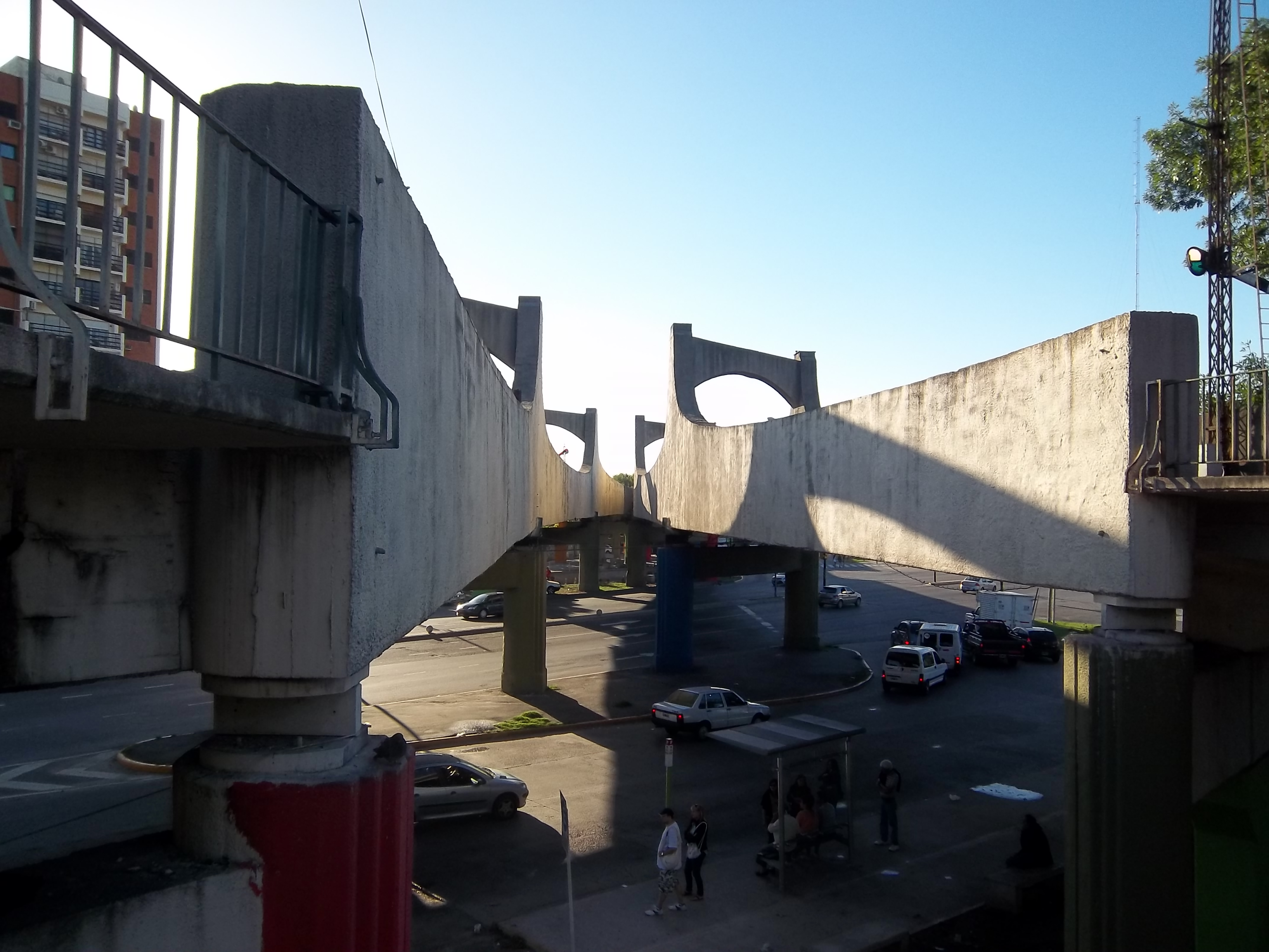 Puente sobre la avenida Presidente Mitre desde la estaciòn Sarandí del Ferrocarril Roca en Sarandí, partido de Avellaneda, provincia de Buenos Aires, Argentina.